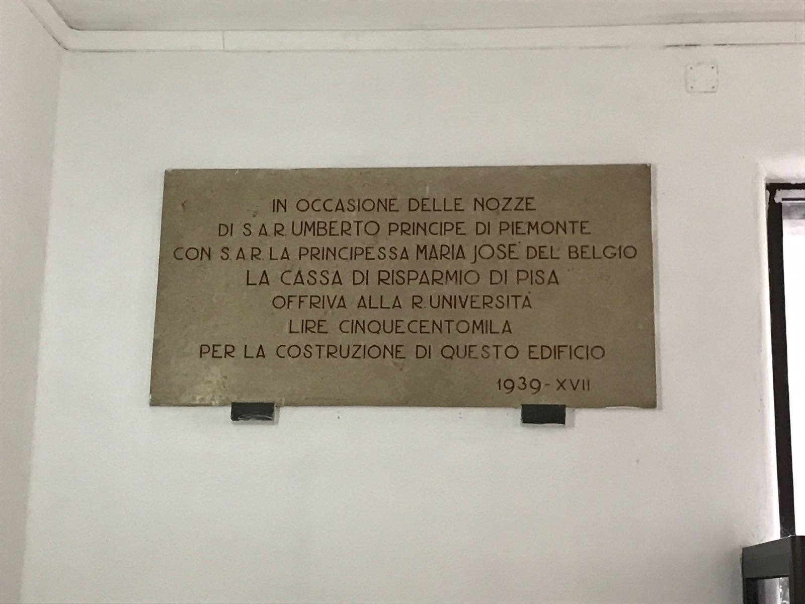 Iscrizione che testimonia la cessione di cinquecentomila lire da parte della cassa di risparmio all'Università per la costruzione della Clinica Pediatrica.